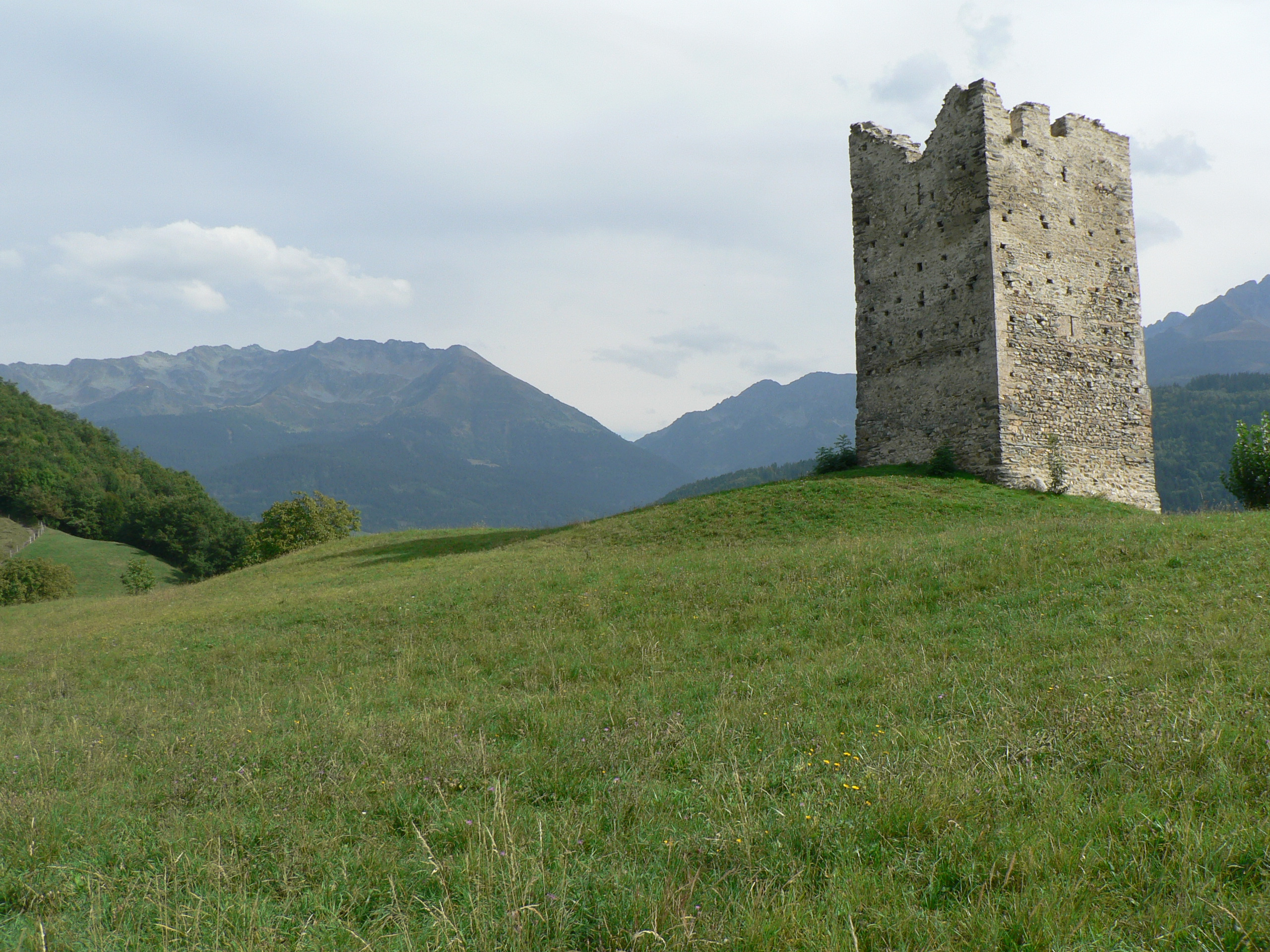 Tour de Montfallet, (Inscrit, 1937)